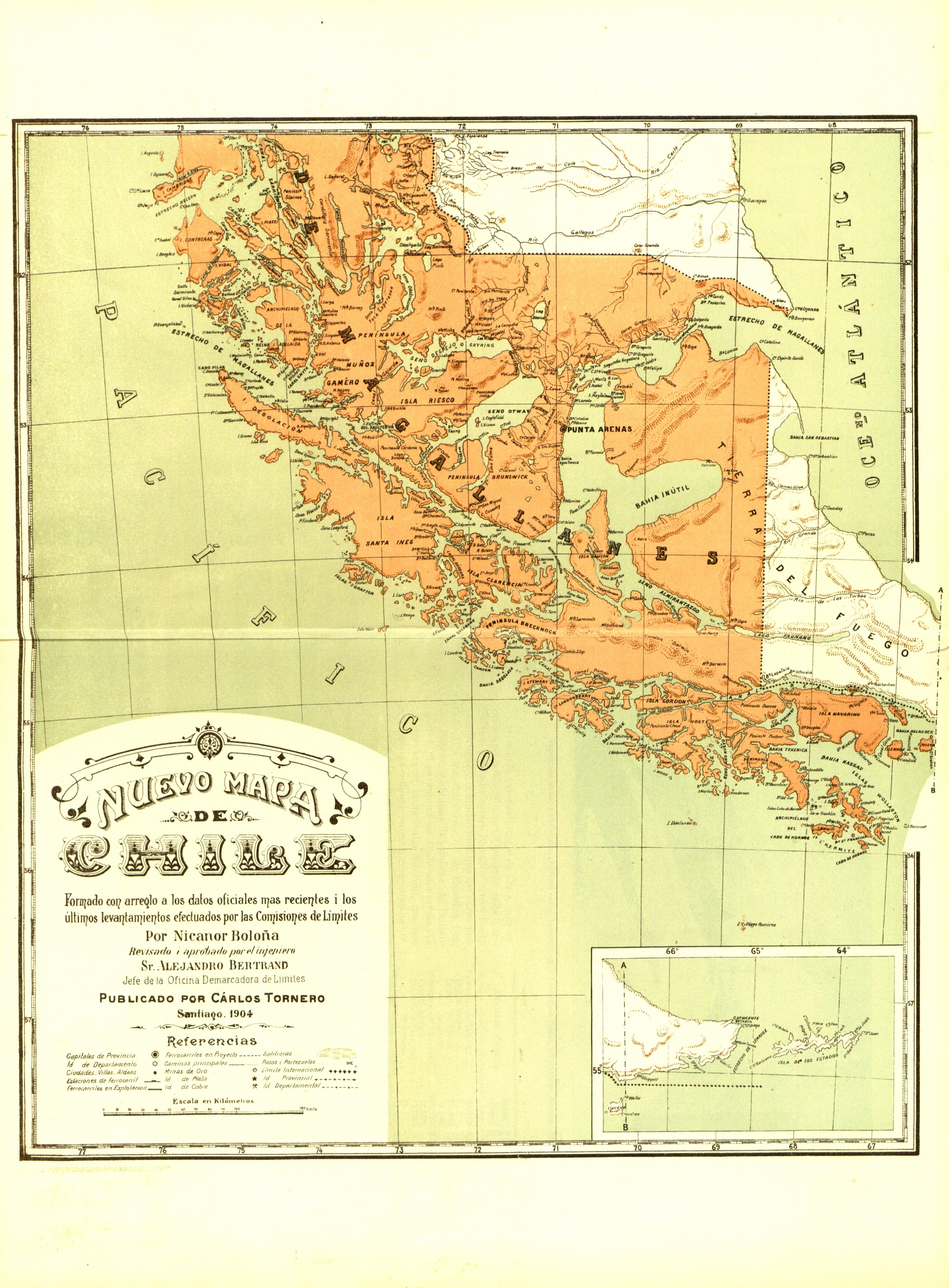 Mapa de Chile 1904 publicada por Carlos Tornero en Chile descripción física, política, social industrial y comercial de la república de Chile